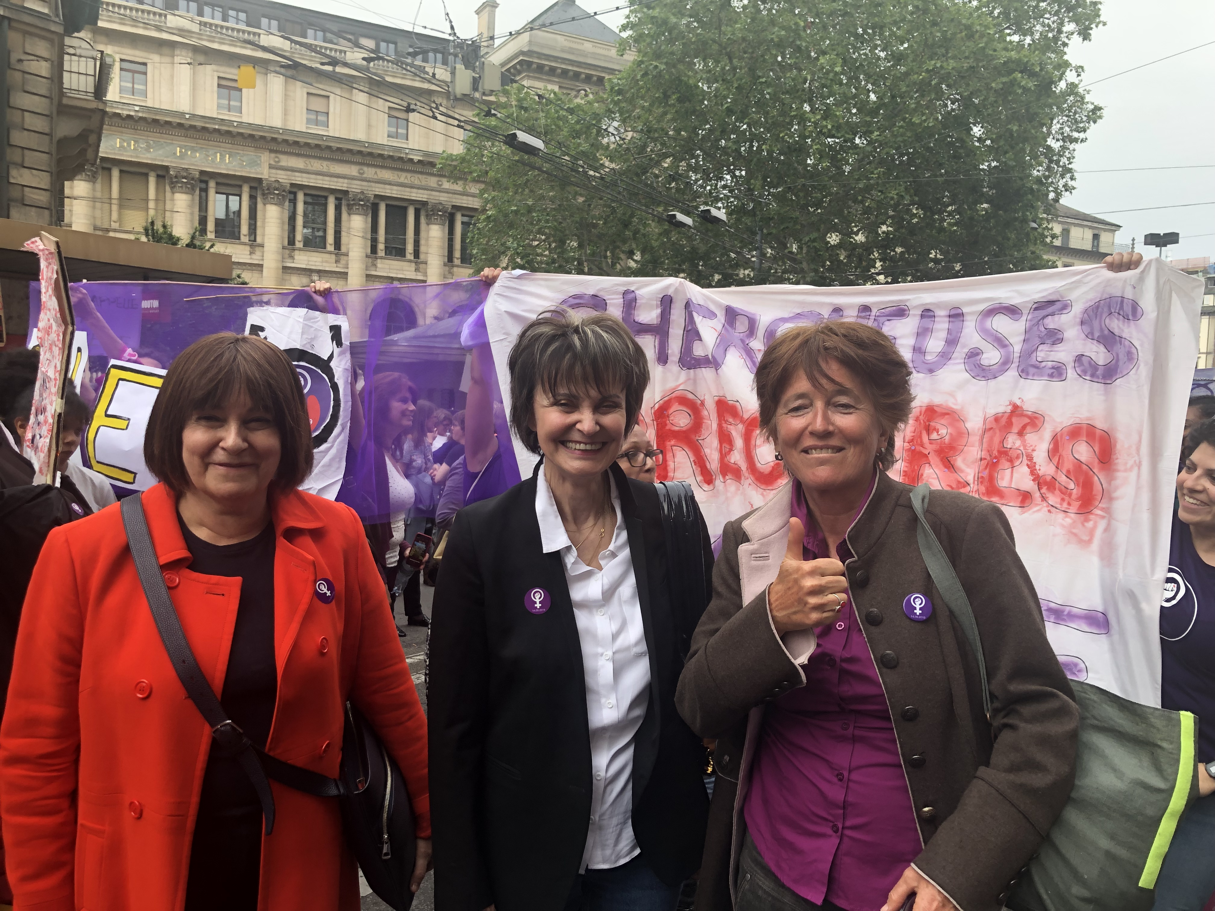 Grève des femmes 14 juin 2019 à Genève